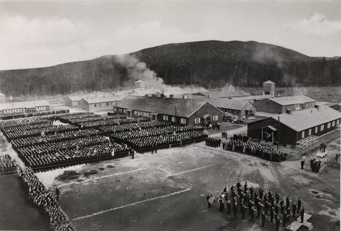 Den siste appel på Grini fangeleir, feiring av frigjøring og fred, siste apell på Grini fangeleir, oppstilling, musikkorps, brakker.